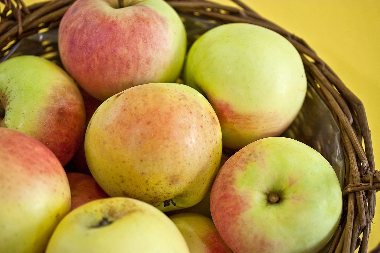 Der Croncels ist eine Apfelsorte